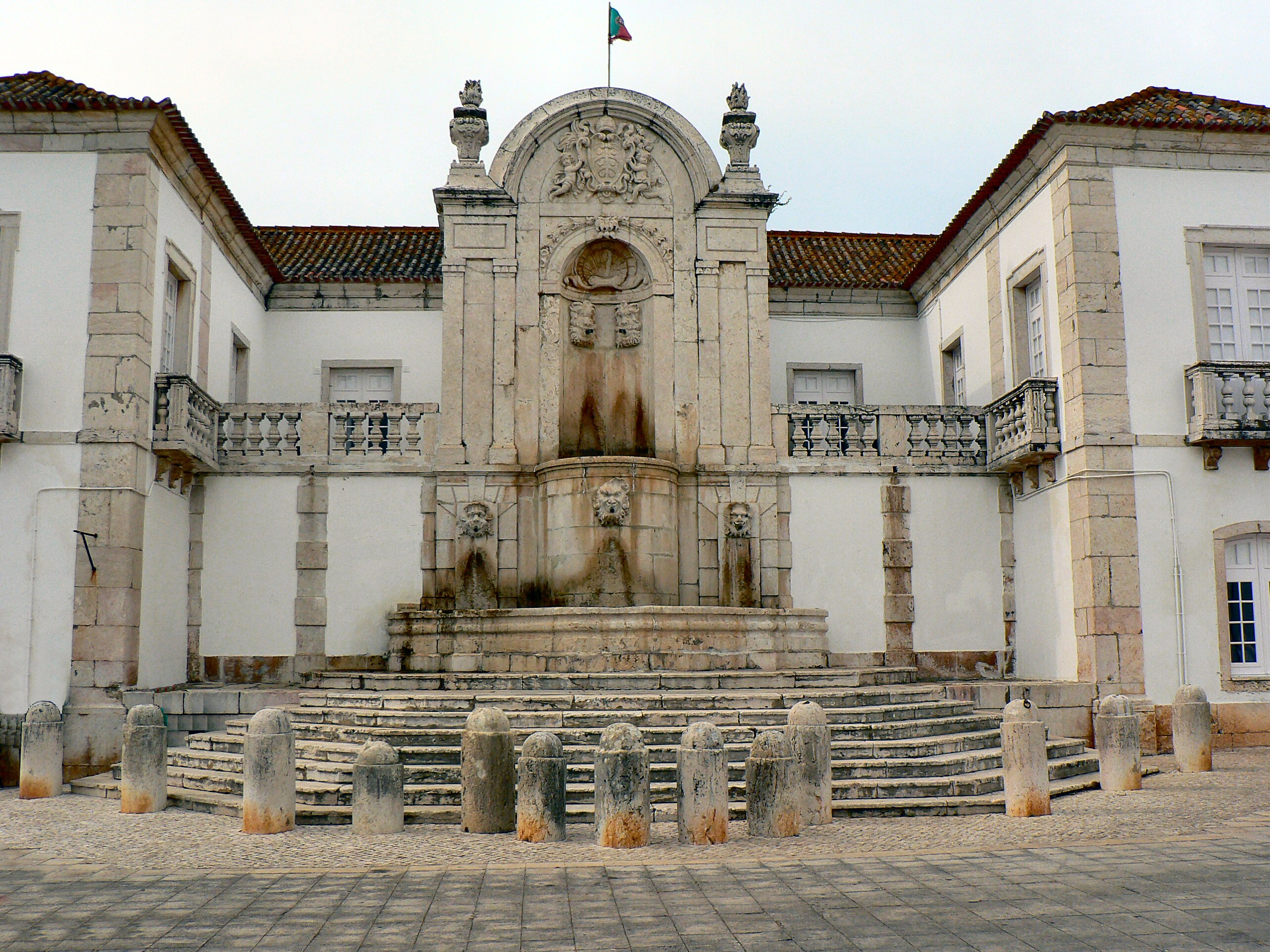 Aqueduto de Santo Antão do Tojal